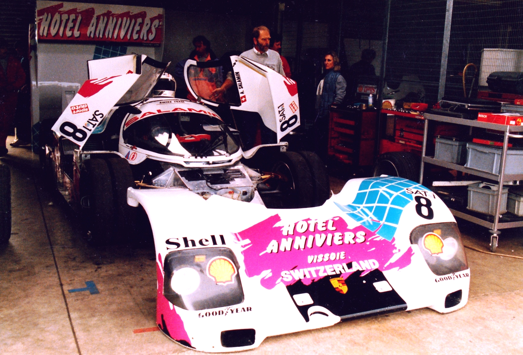 Test de double-pneus effectué par Antoine Salamin lors de l'épreuve Supercup de Silverstone, le 14 mai 1989